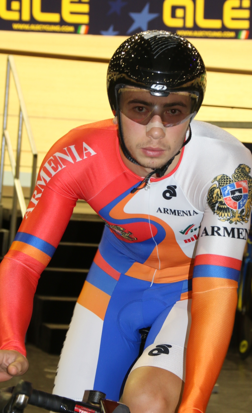 Edgar Stepanyan, armenischer Radsportler